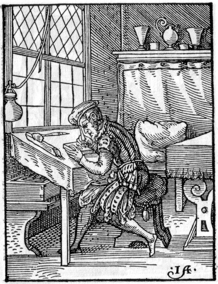 Der Formschneider Holzschnitt aus: Jost Amman (1539-1591): Eygentliche Beschreibung aller Stände auff Erden hoher und nidriger, geistlicher und weltlicher, aller Künsten, Handwerken und Händeln ... (erstmals Frankfurt am Main 1568; auch bekannt als: Das Ständebuch) Im Buch wird das Bild von folgendem Text von Hans Sachs begleitet: Ich bin ein Formenschneider gut, Als was man mir für reissen thut, Mit der federn auff ein form bret Das schneid ich denn mit meim geret, Wenn mans denn druckt so sind sich scharff Die Bildnuß, wie sie der entwarff, Die steht, denn druckt auff dem papyr, Künstlich denn auß zustreichen schier. (Anmerkung: für reissen thut = vorzeichnet, geret = Gerät, hier: Schnitmesser, künstlich auß zustreichen = kunstvoll auszumalen)